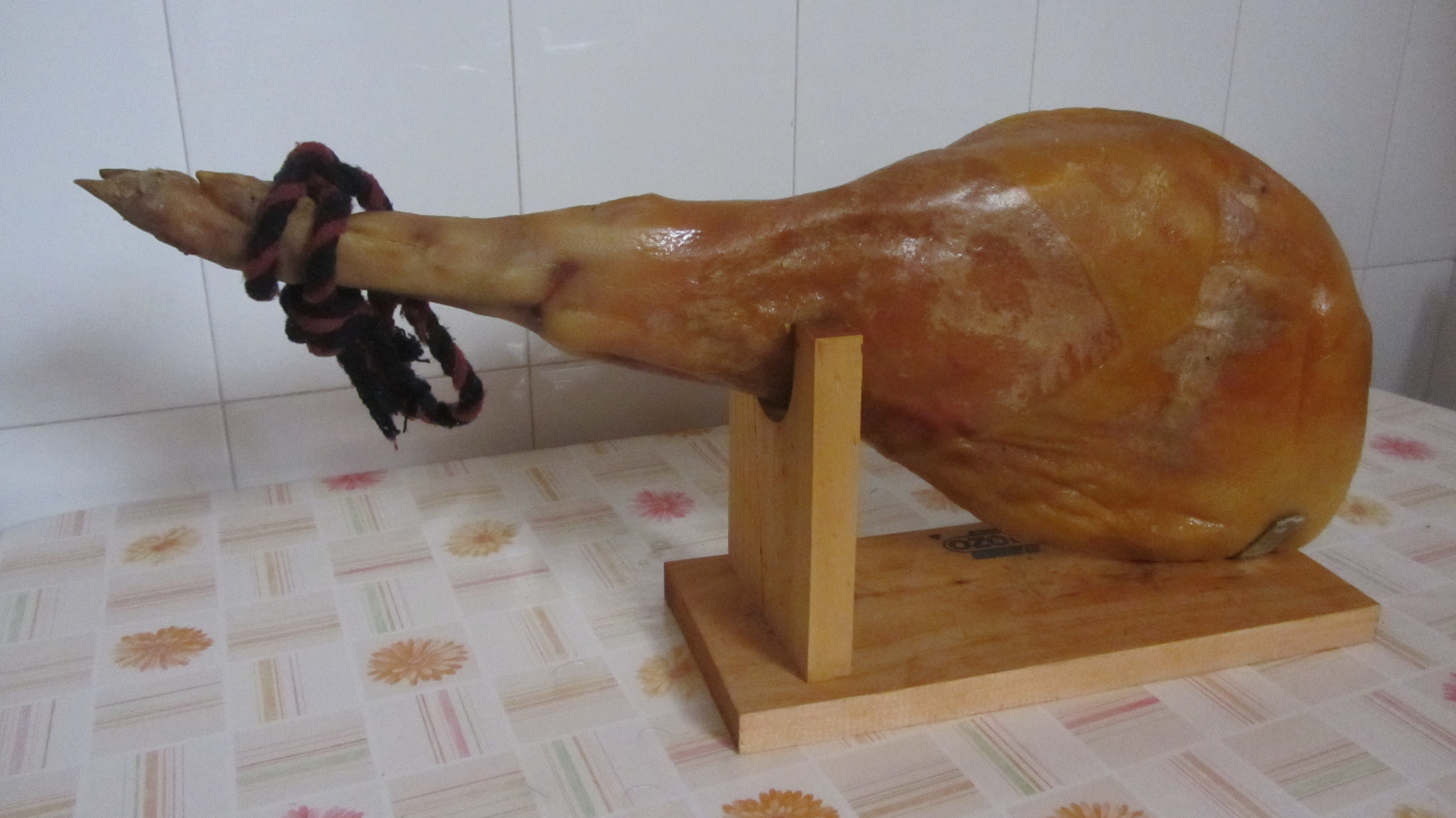 Jamón ibérico sobre soporte jamonero o jamonera.